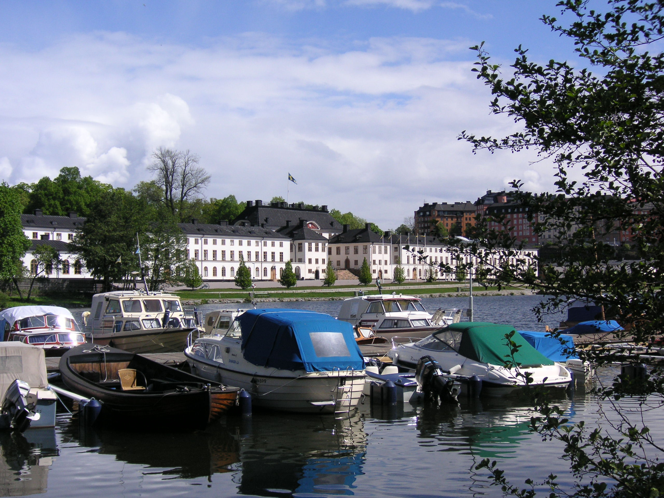 Karlbergssjön i Stockholm med Karlbergs slott i bakgrunden.